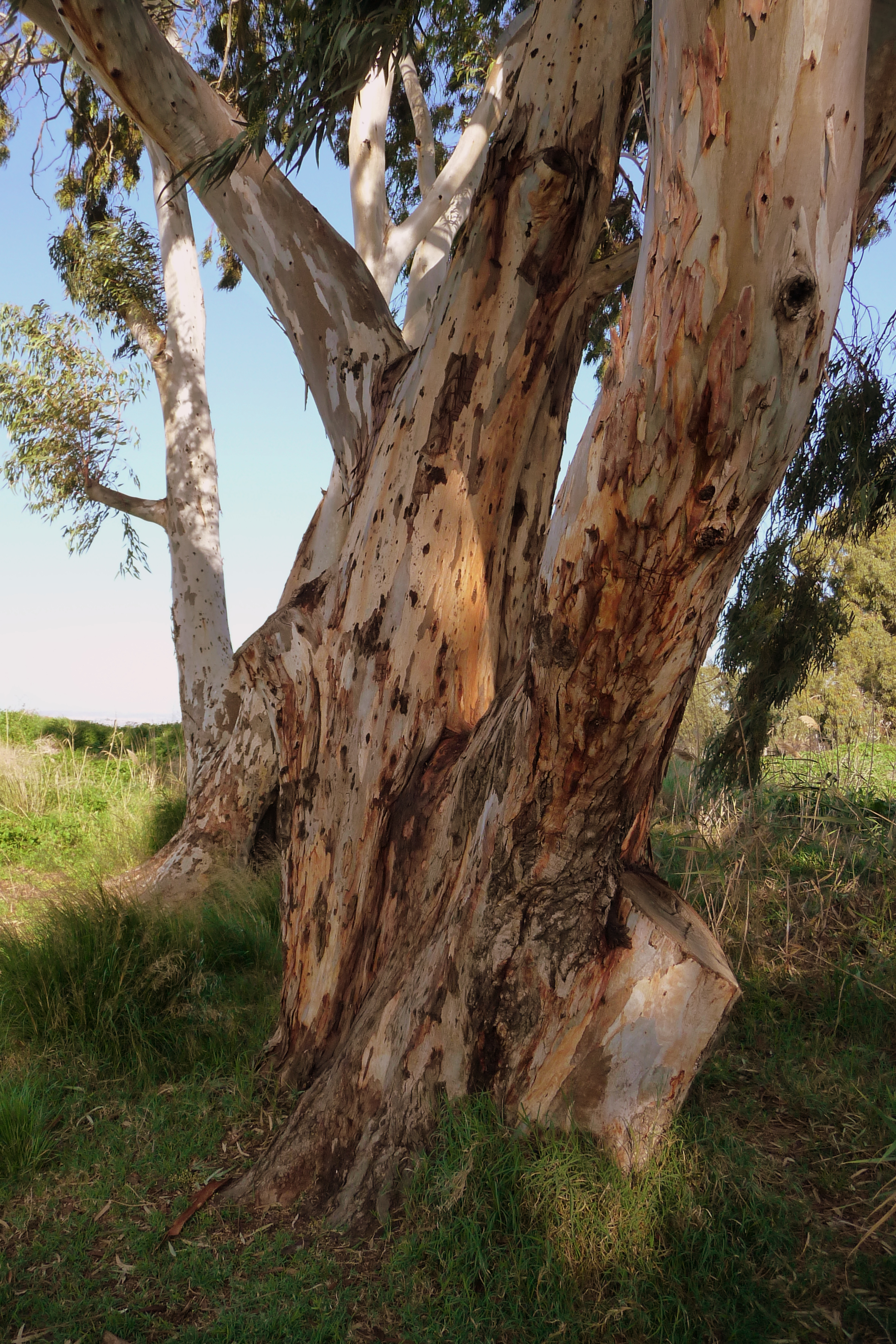 שמורת טבע בעמק זבולון, מזרחית לקריית ביאליק. השמורה כוללת הן את המעיינות והביצות המהווים את מקורו של נחל נעמן והן את האתר הארכאולוגי תל אפק. השמורה הוכרזה ב-1979 והיא משתרעת על פני 660 דונם. ב-1996 הוכרה השמורה כ"אתר רמסר" בהתאם לאמנת רמסר לשימור ולפיתוח בר-קיימא של בתי גידול לחים.